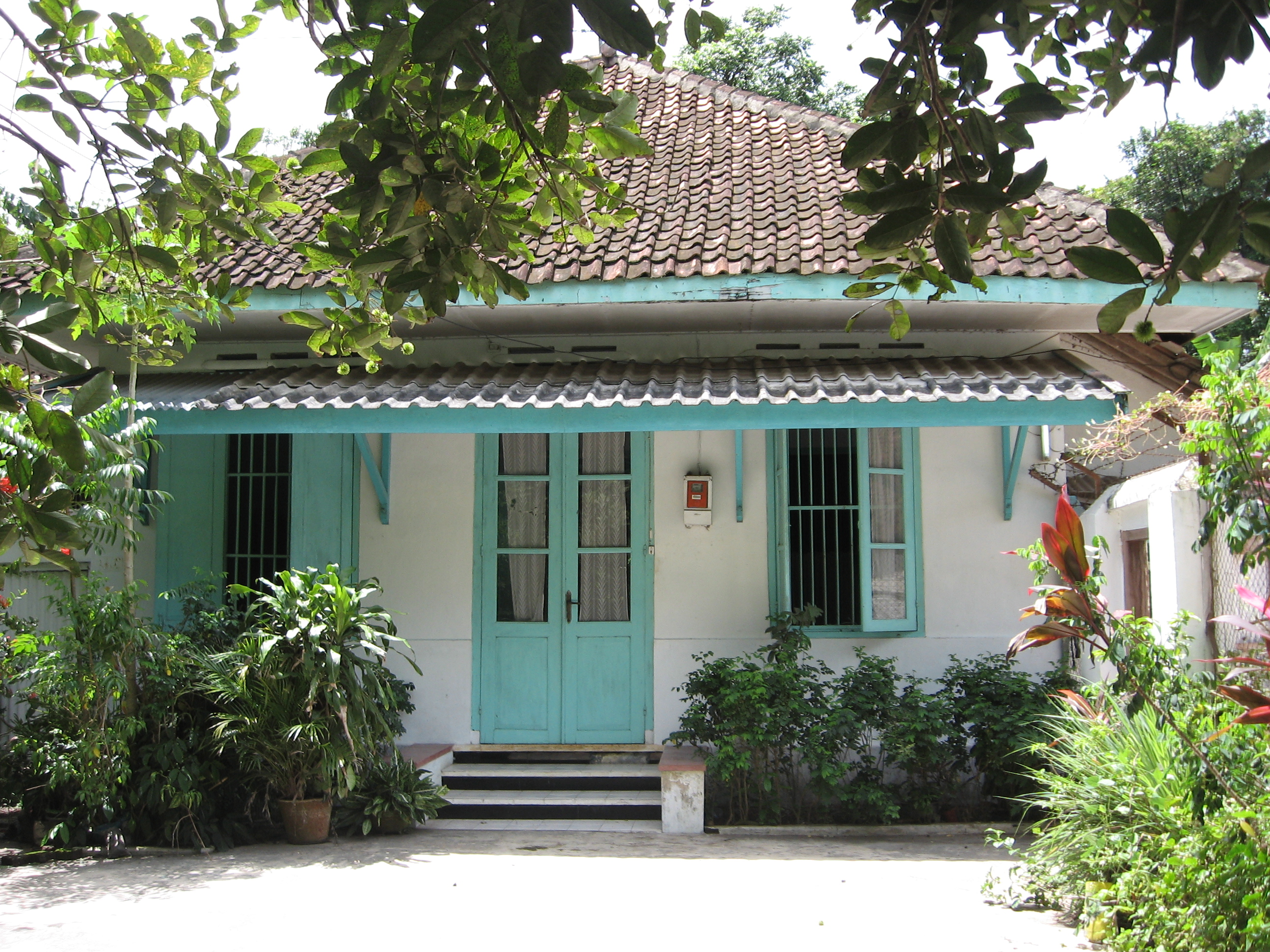 RUMAH MBAH RANOEREDJO KENCONG